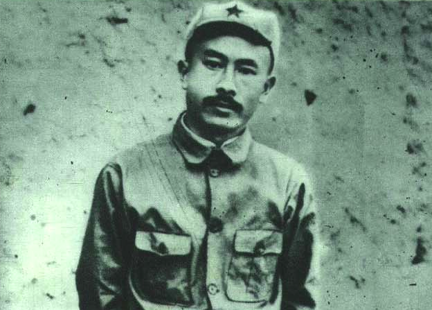 长征时候的任弼时